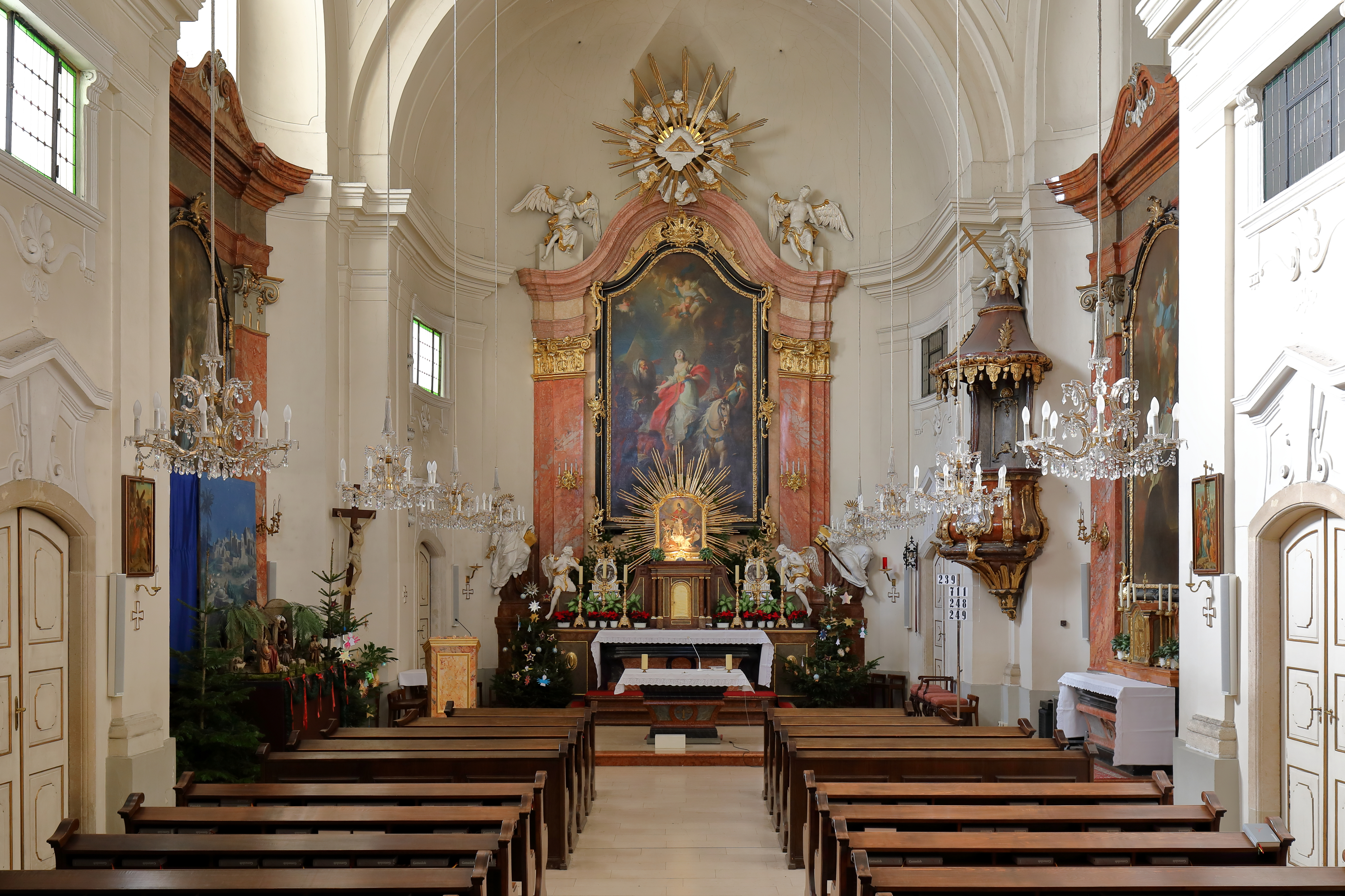 Innenansicht der röm.-kath. Filialkirche St. Thekla, auch Piaristenkirche bzw. Theklakirche bezeichnet, im 4. Wiener Bezirk Wieden.Die Kirche wurde ab ca. 1754 nach Plänen von Matthias Gerl errichtet und am 26. September 1756 geweiht. Als Kirchenpatronin fungierte die hl. Thekla. Das Hochaltarbild der hl. Thekla ist ein Werk von Felix Ivo Leicher, der auch die zwei Seitenaltarbilder (hl.Josef von Calasanz und Maria Immaculata) malte.